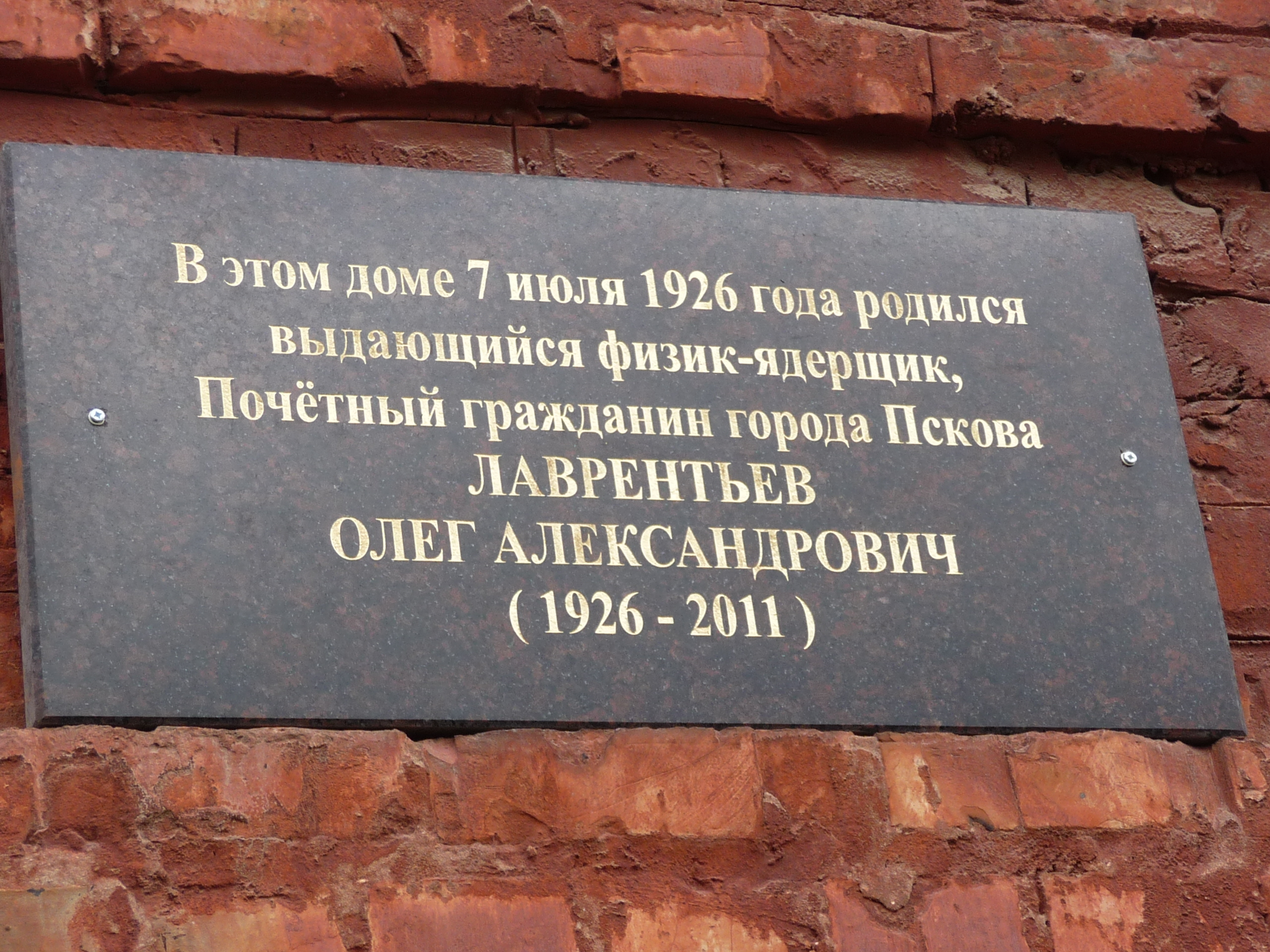 Памятная доска в Пскове